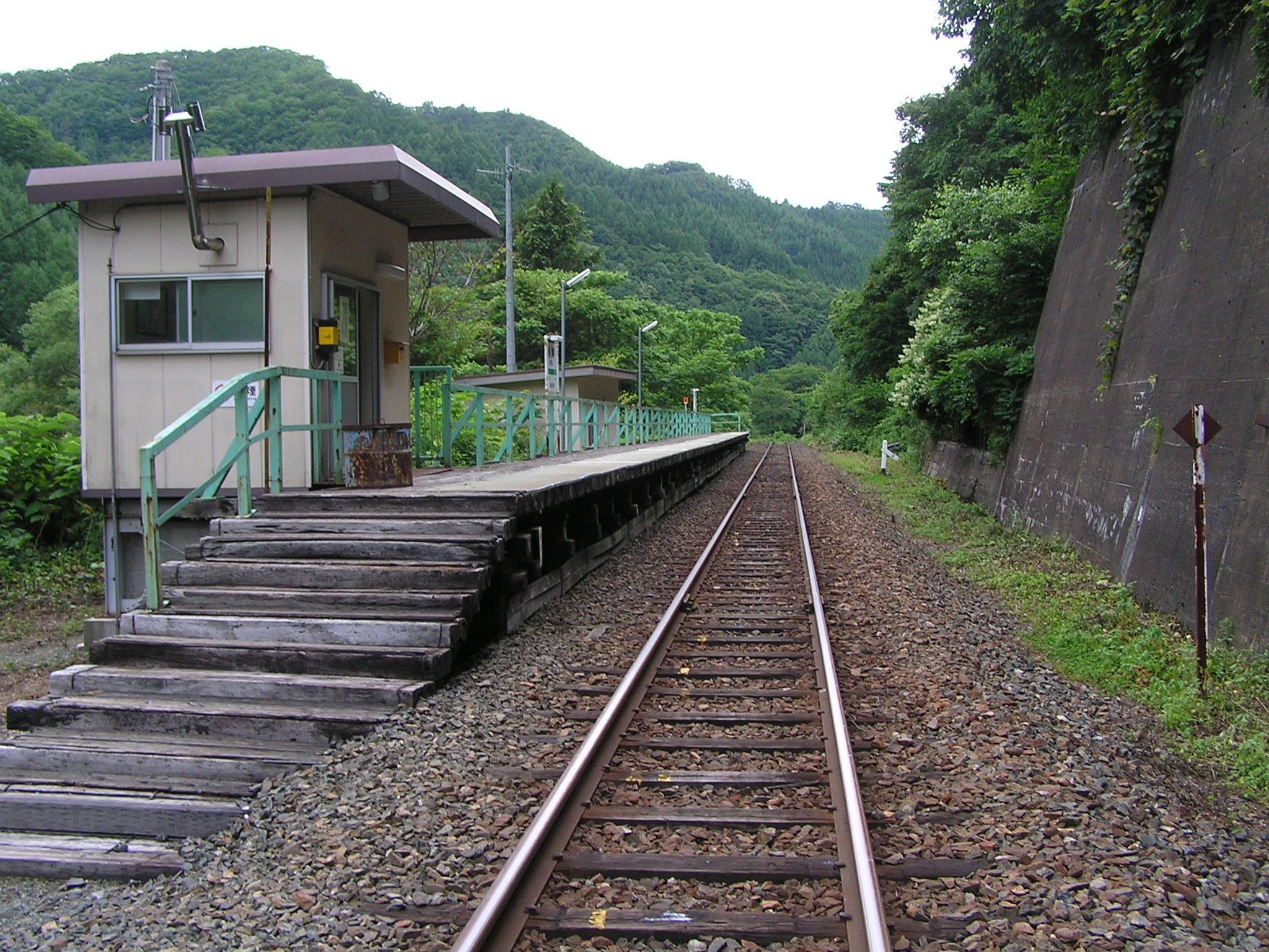 Asagishi Station, Morioka, Iwate, Japan